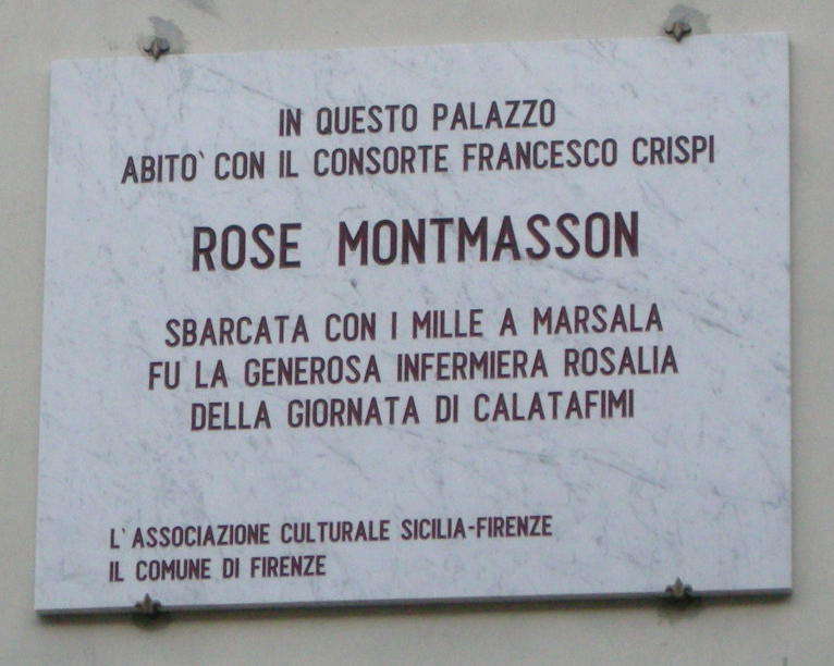 Lapide in via della Scala a Firenze per Rosa Montmasson, moglie di Francesco Crispi.